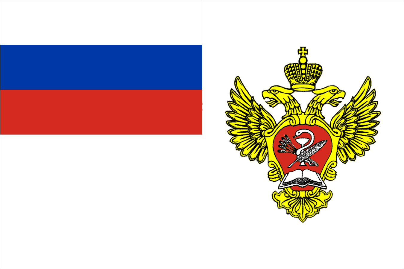 Флаг Федерального агентства научных организаций, Россия “Флаг Федерального агентства научных организаций представляет собой прямоугольное белого цвета полотнище с соотношением сторон 2 x 3, в крыже — государственный флаг Российской Федерации, в правой половине — большая эмблема Федерального агентства научных организаций, расположенная равноудалёно от сторон флага.”